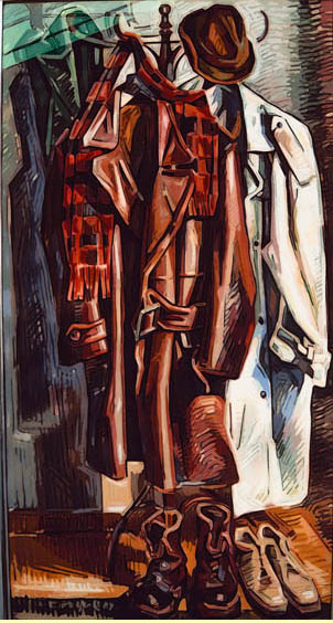 Garderobe, Pastell von Carsten Eggers, 90 x 180